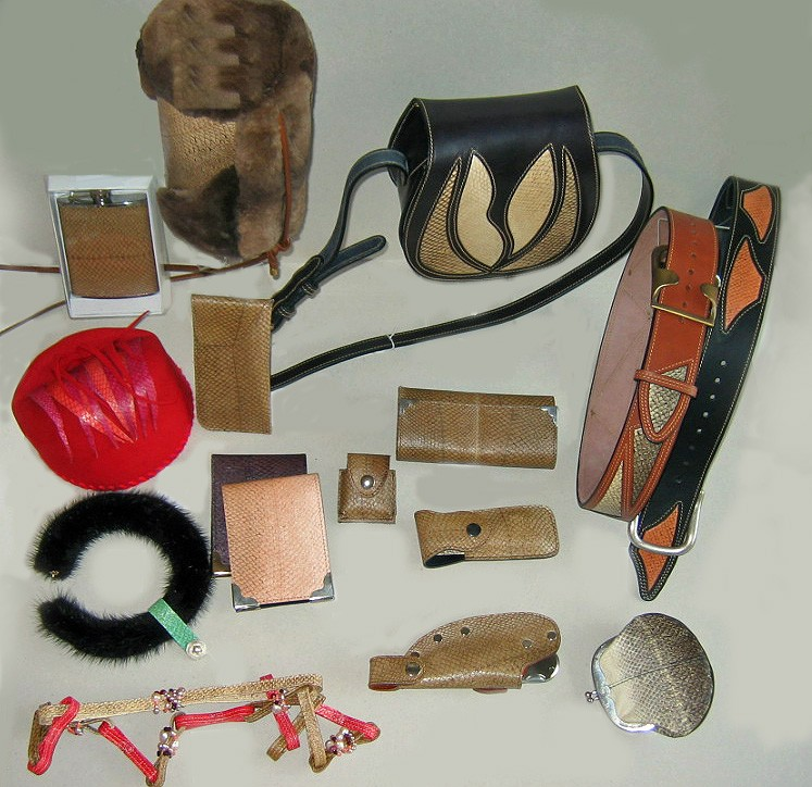 Fischleder